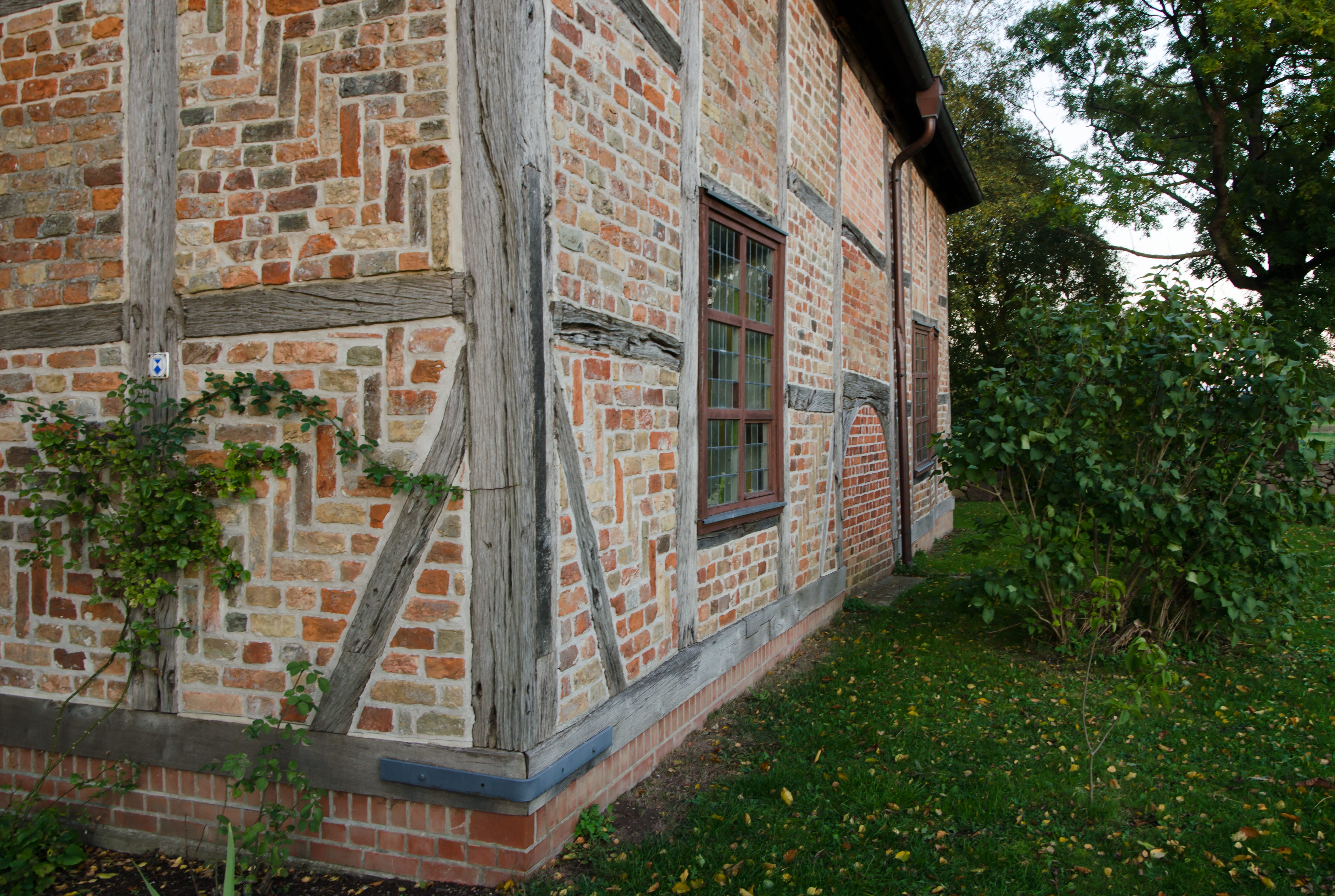 Langen Trechow Kapelle Südwand mit historischem Eingang